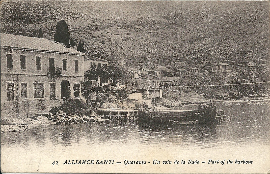 Santi-Quaranta (Sarandë ou Saranda, en Albanie) - Un coin de la rade - avant 1919 (date d'envoi postal de la carte)